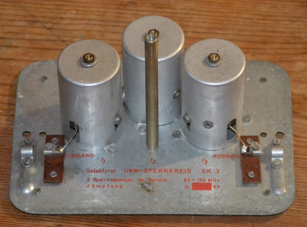 Sperrkreis für UKW-Empfang, um starke Sender auszublenden.